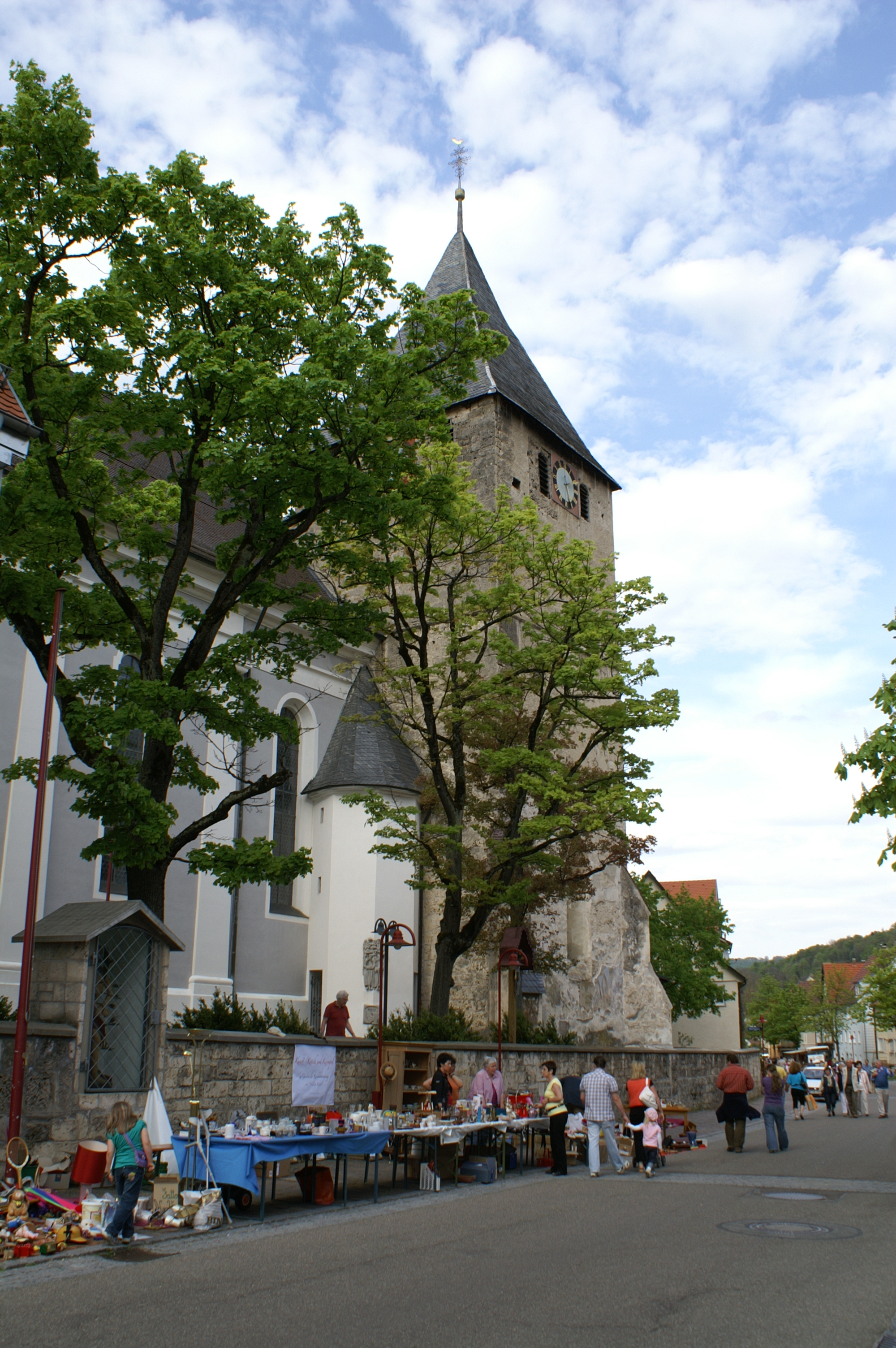 Flohmarkt zu Gunsten der Kirchenrenovierung von Heilig Kreuz beim verkaufsoffenen Sonntag im April 2009